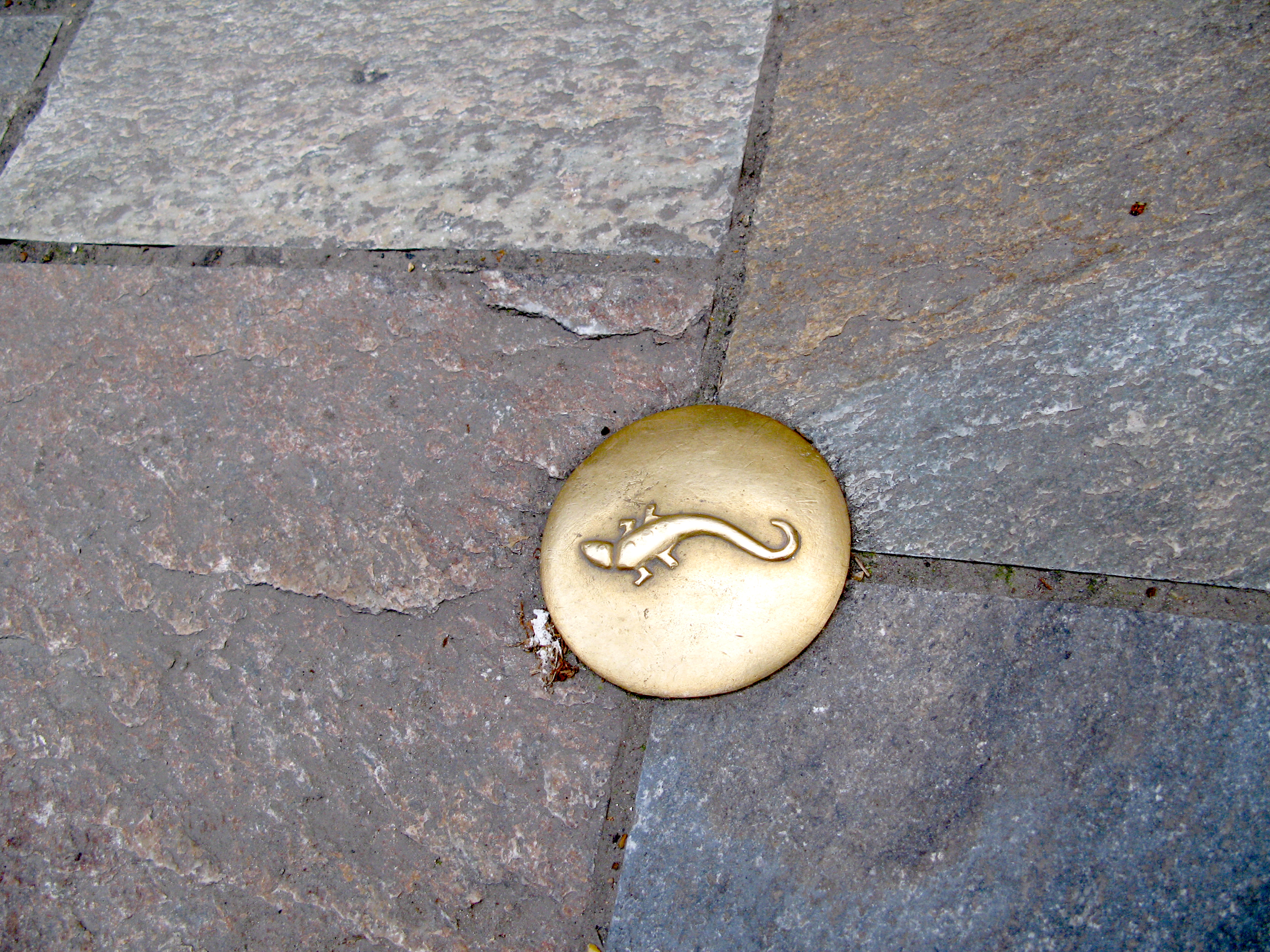 Beauvais (Oise, France) - Plot de laiton fixé sur le sol, indiquant aux touristes le parcours à suivre. Le motif décoratif est une salamandre.